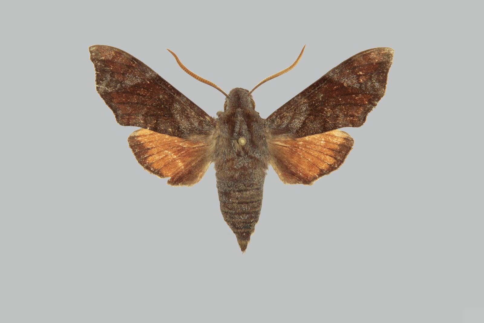 Dahira taiwana, male, upperside. Taiwan, Taoyuan, 16km E of Fuhsing